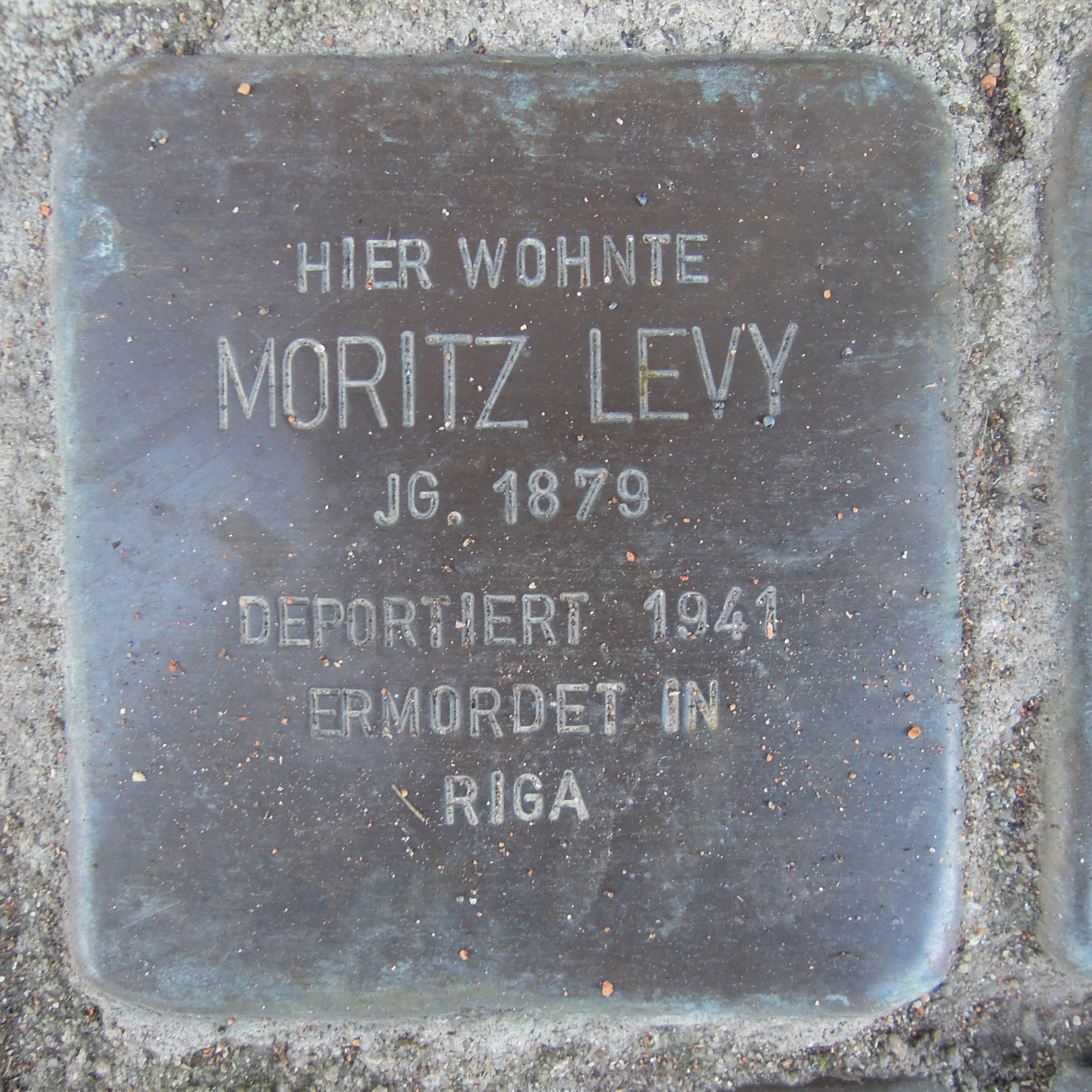 Stolperstein Alpen Bruckstraße 13 Moritz Levy